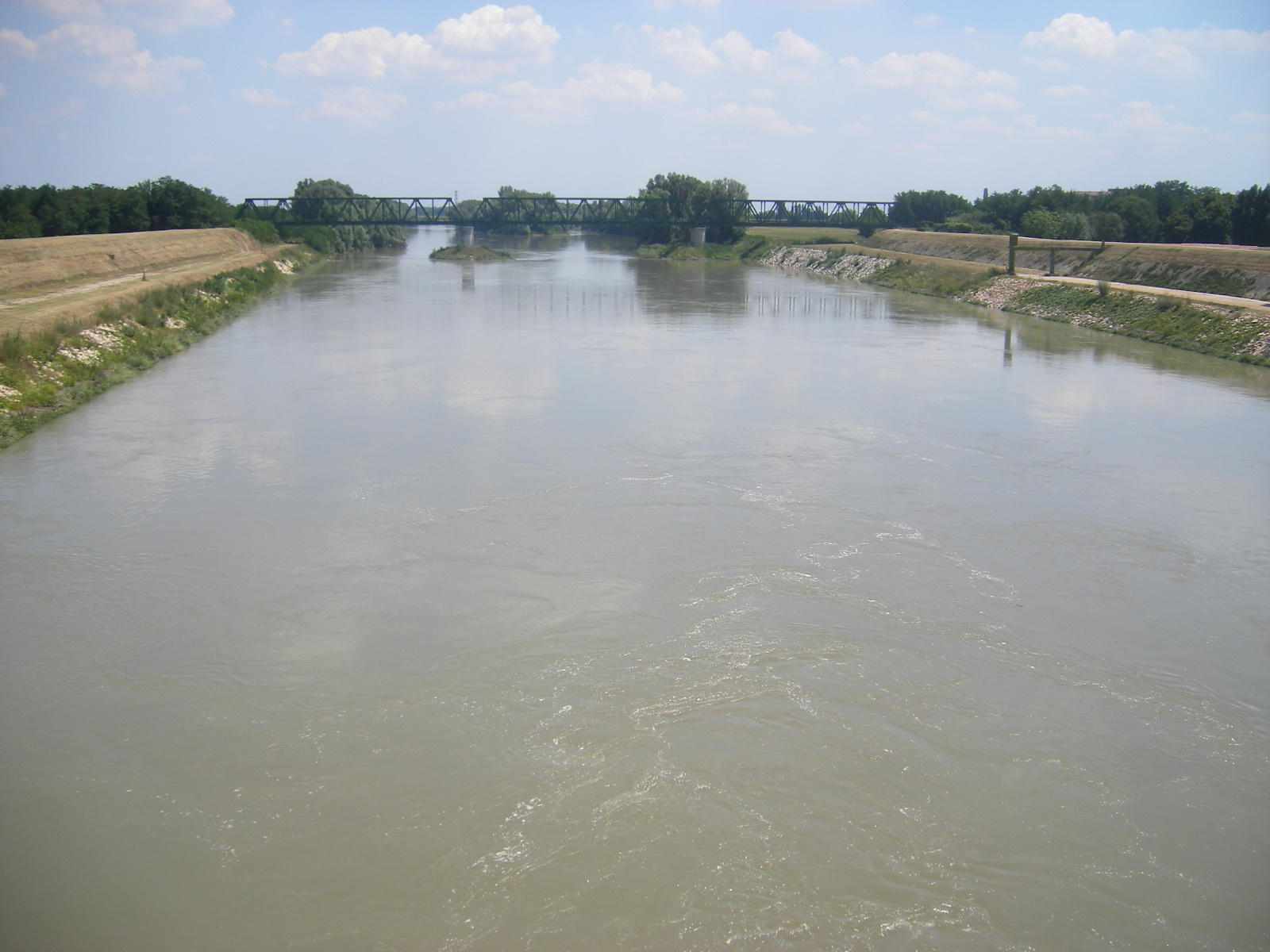 Legnago - Adige River